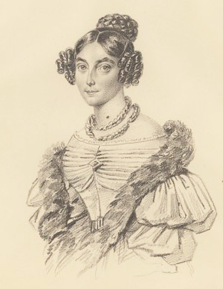 Sopie Lychou (1812-1878)